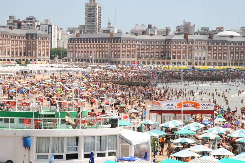 Vista de la playa Bristol y la Rambla de Mar del Plata. Enero de 2006.